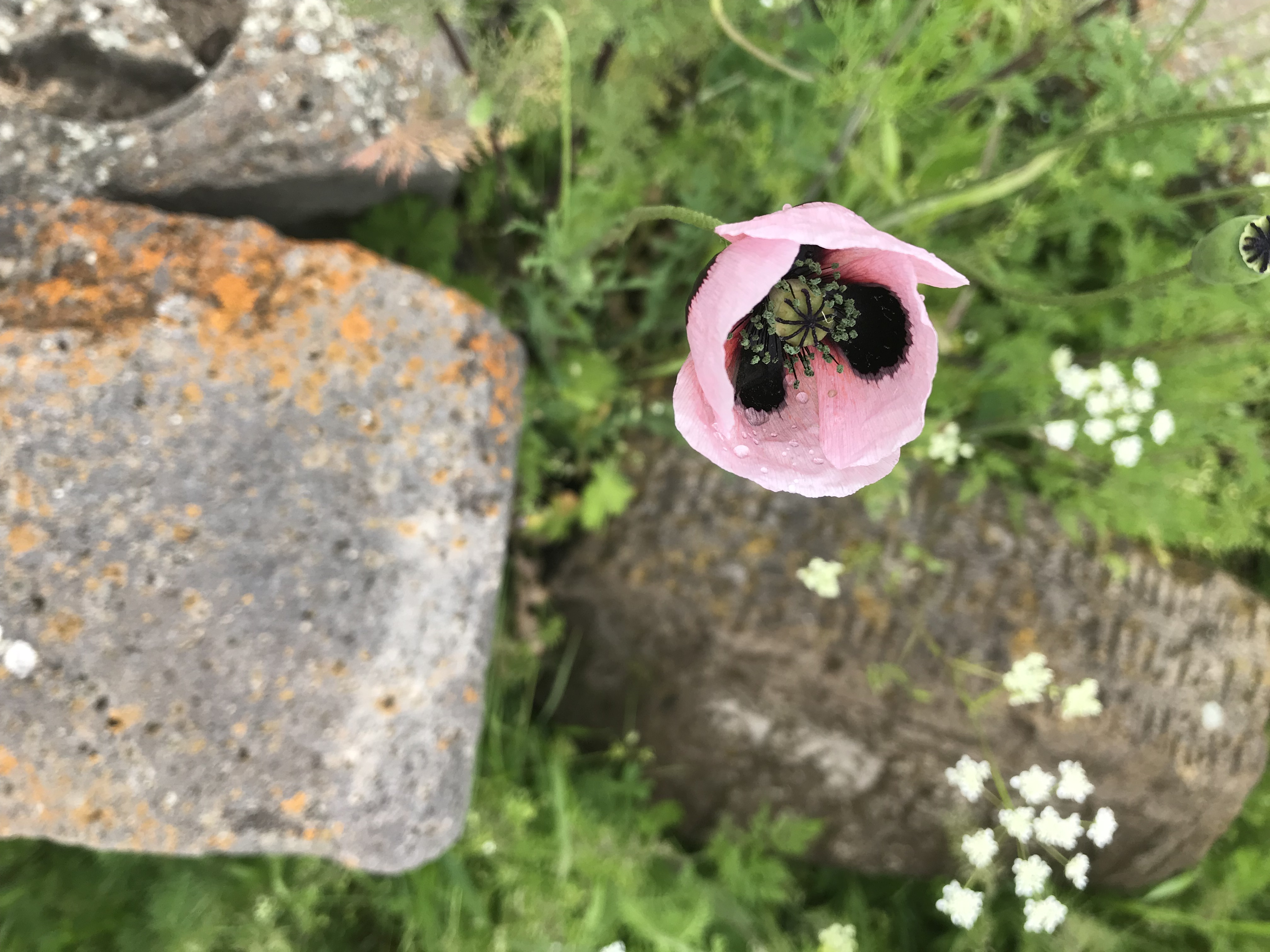 խոսրով